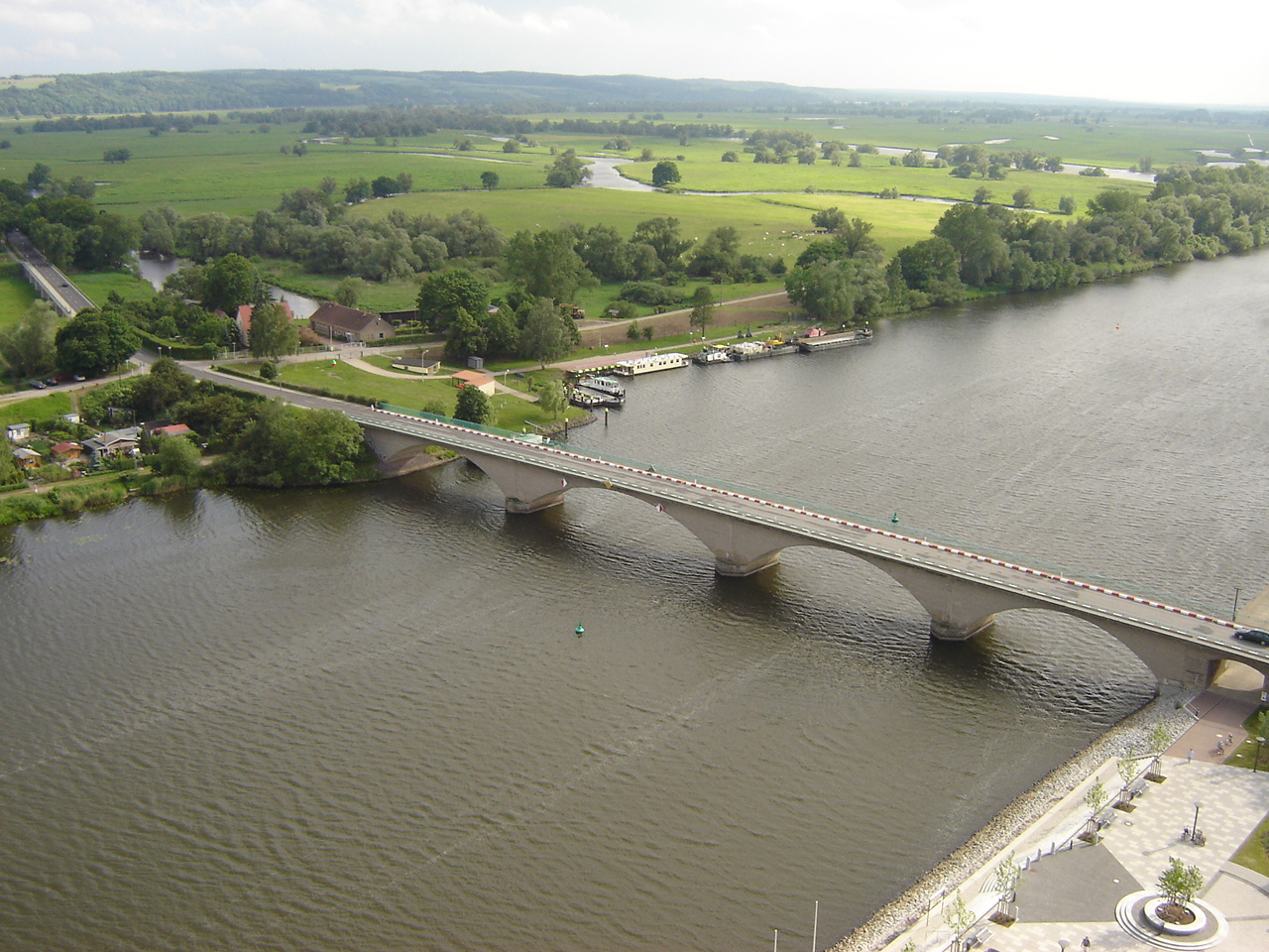 Schwedter Bruecke (Hohensaaten-Friedrichsthaler Wasserstraße; Kanalbruecke)